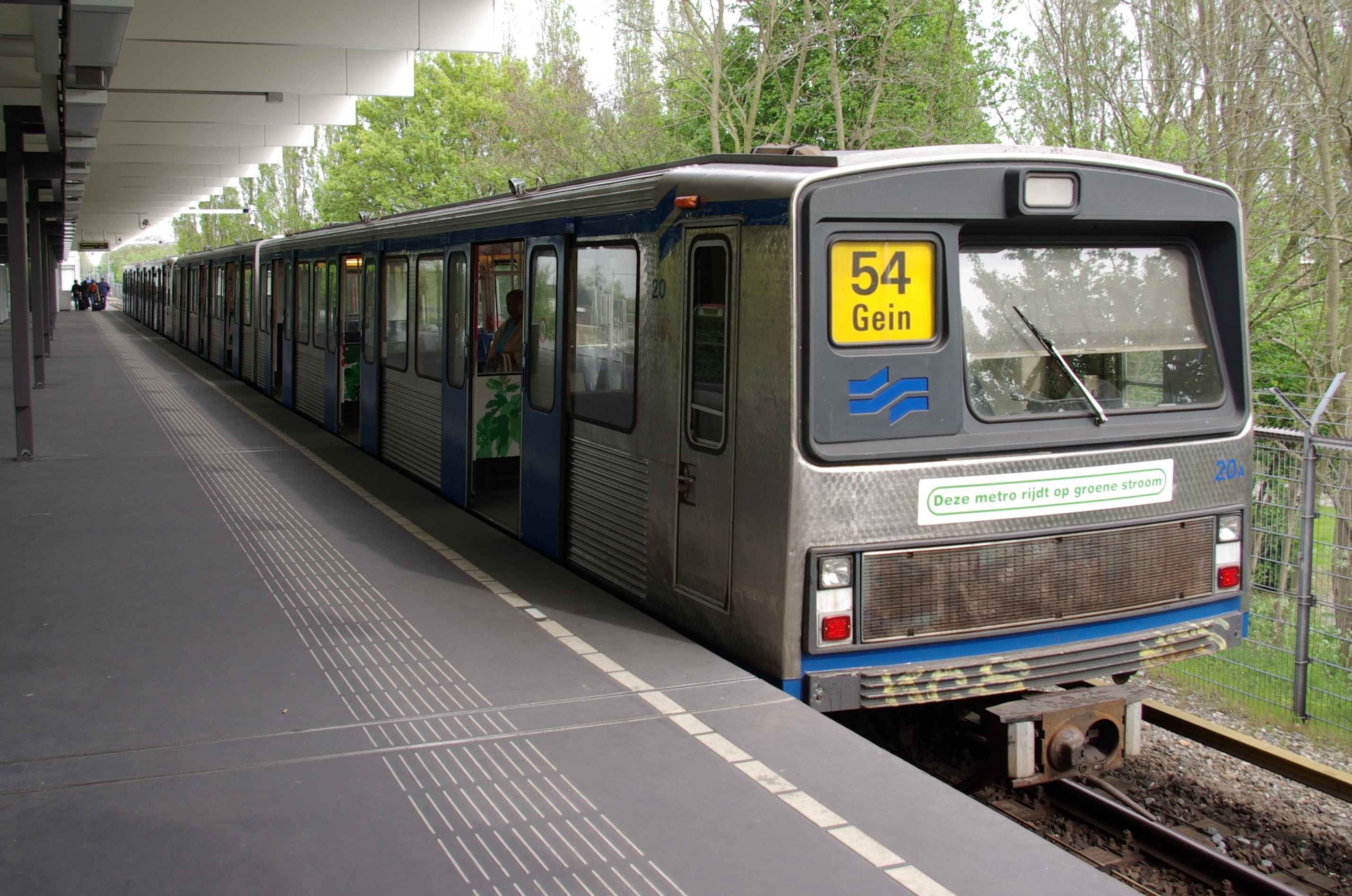 Metrostation Gein, treinstel LHB M2